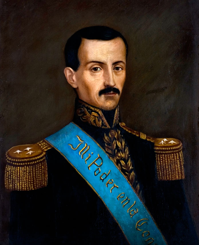 José María Mariano Segundo de Urvina y Viteri (19 March 1808 – 4 September 1891)